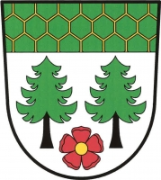 Medový Újezd, znak. Ve stříbrném štítě pod zlatě plástvovanou zelenou hlavou dva zelené smrky s černými kmeny, dole mezi nimi červená růže se zlatým semeníkem.